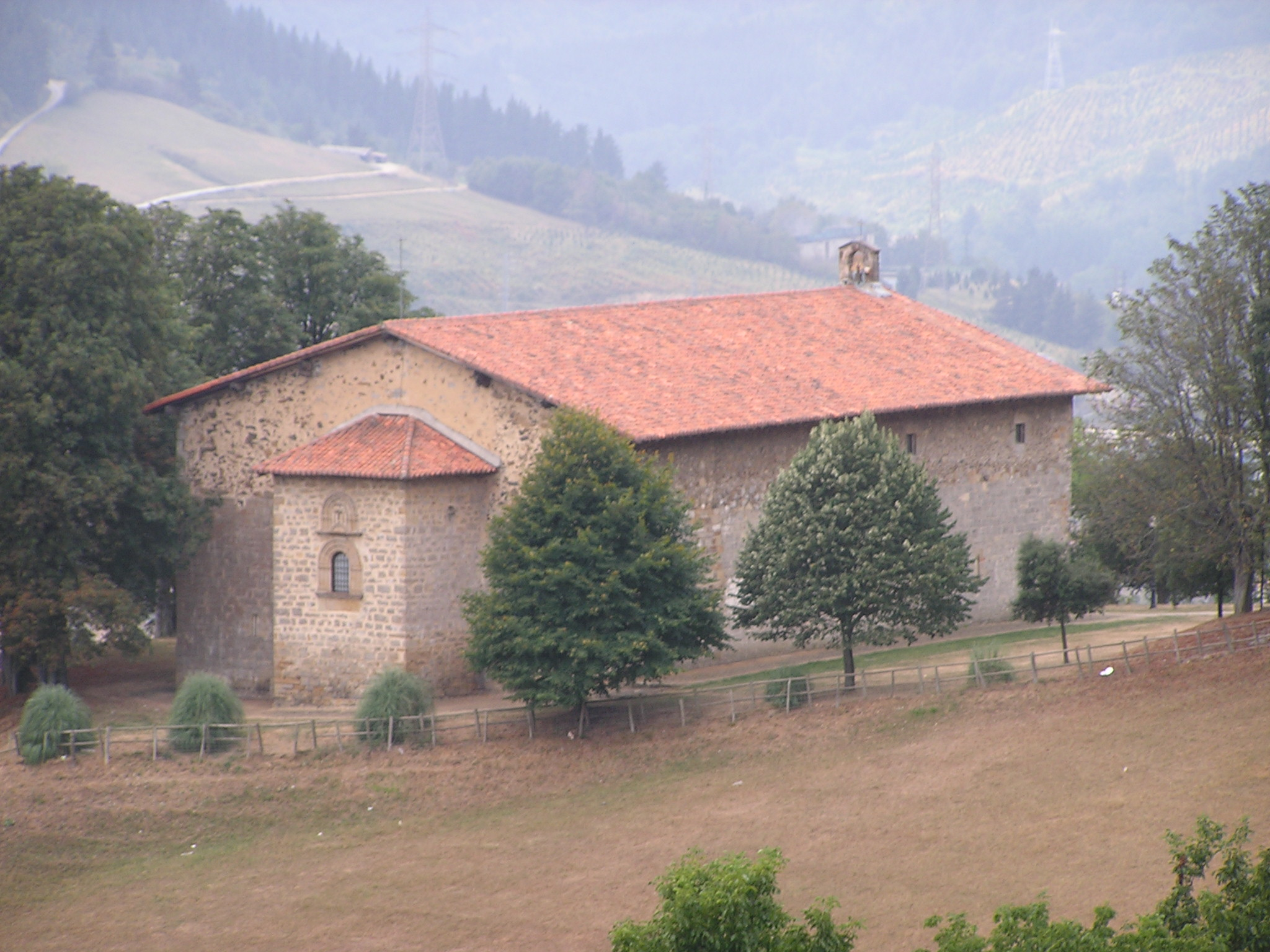 zumarragan kokatuta dagoen antioko baseliza